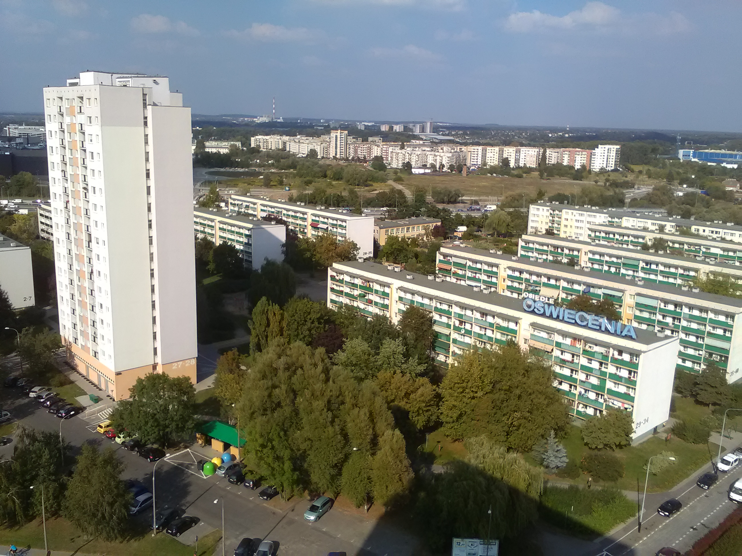 Widok na osiedle Oświecenia i ulicę Śremską w Poznaniu.